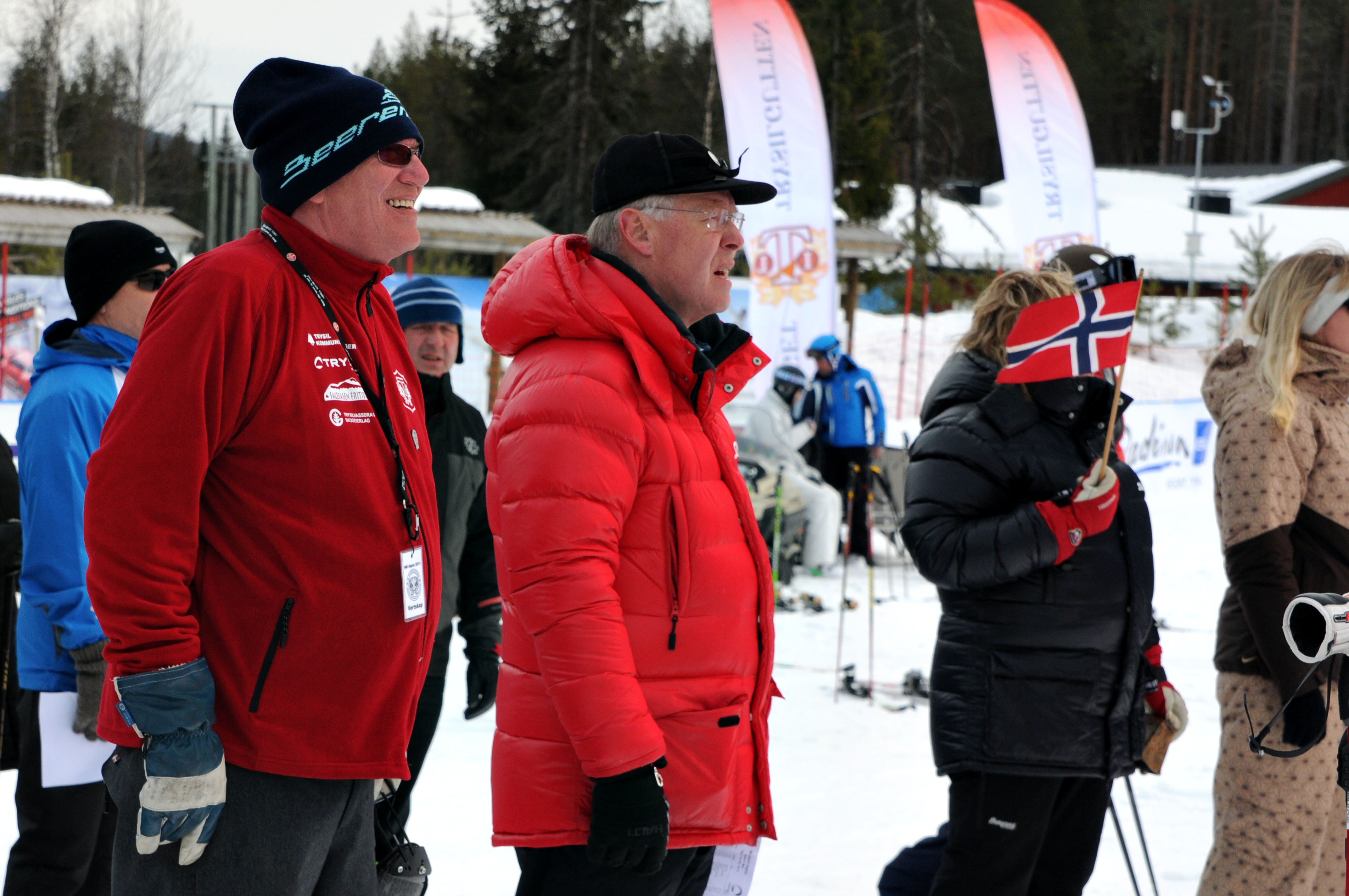 Skipresidenten var på plass under NMs siste dag i Trysil. Til venstre står nestleder i NM-komiteen, Bernt Amdahl.